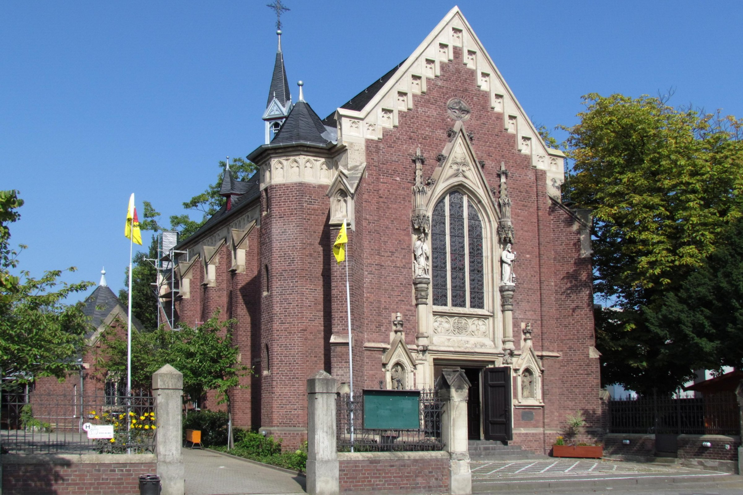 katholische Kapelle St. Aloysius, genannt Brandts Kapelle, in Mönchengladbach-Waldhausen, Rudolfstraße 5; erbaut 1896; unter Denkmalschutz